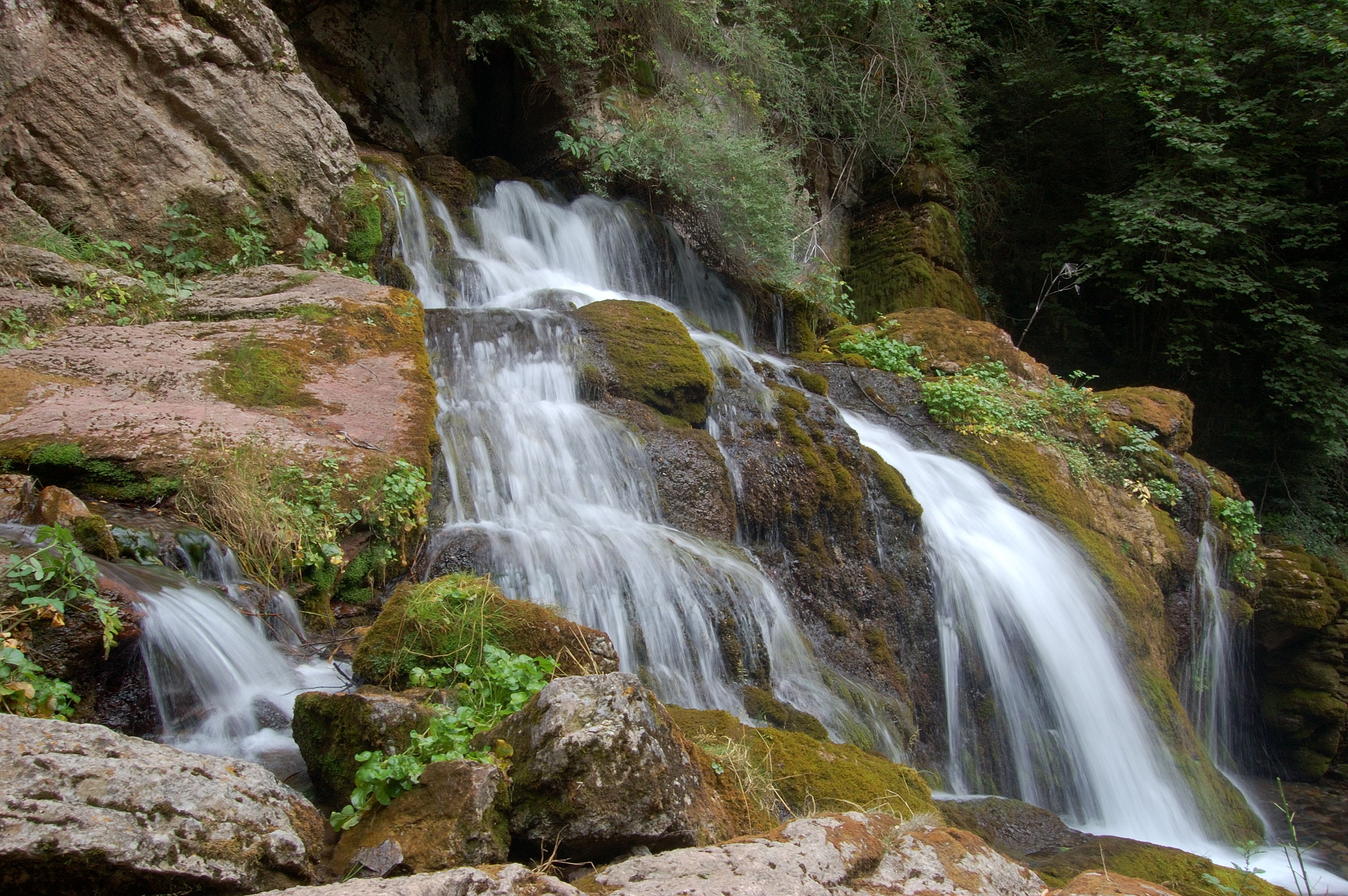 Fonts del Llobregat, Bagà, Berguedà, Catalunya, Espanya